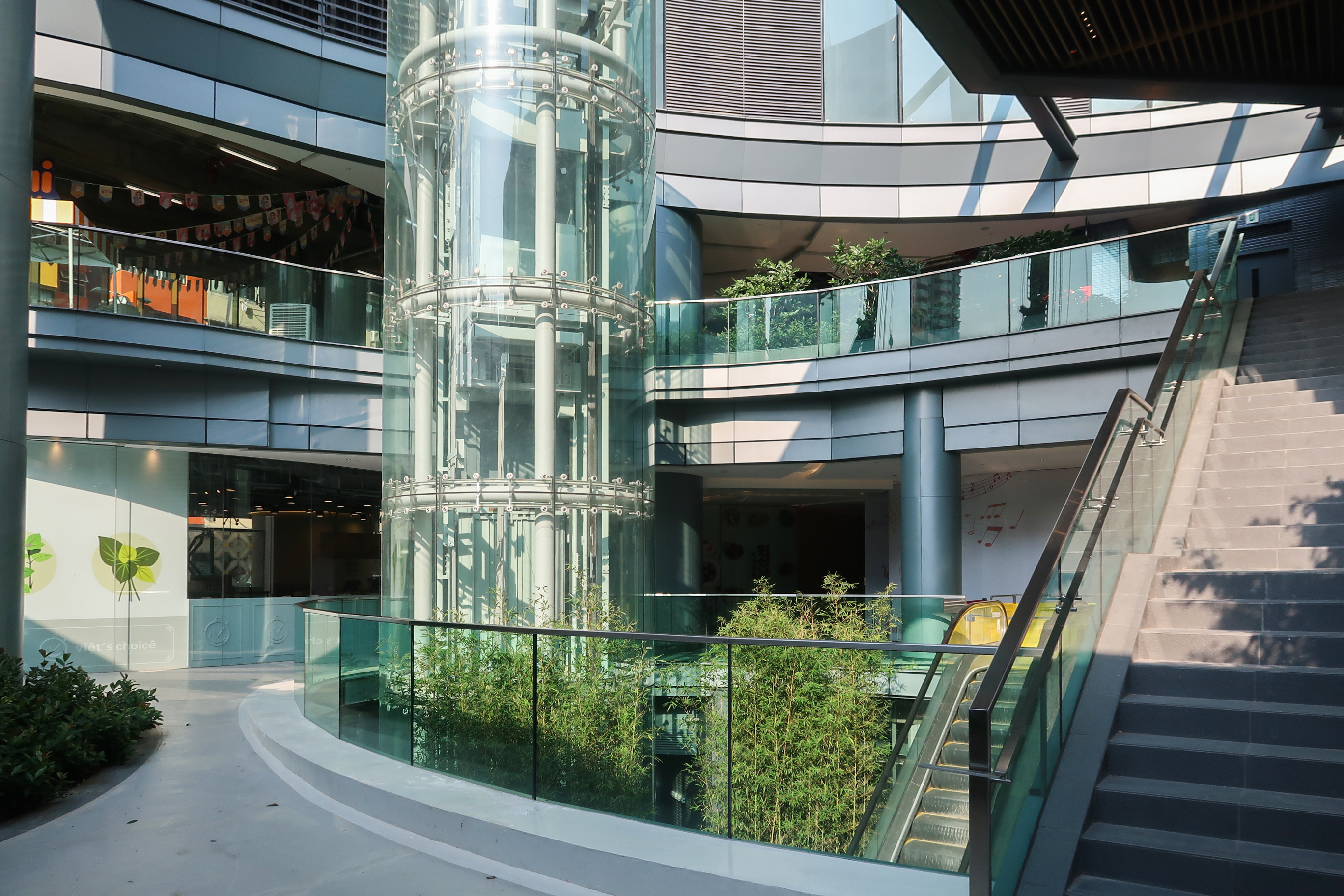 Square Mile Q Entrance 1